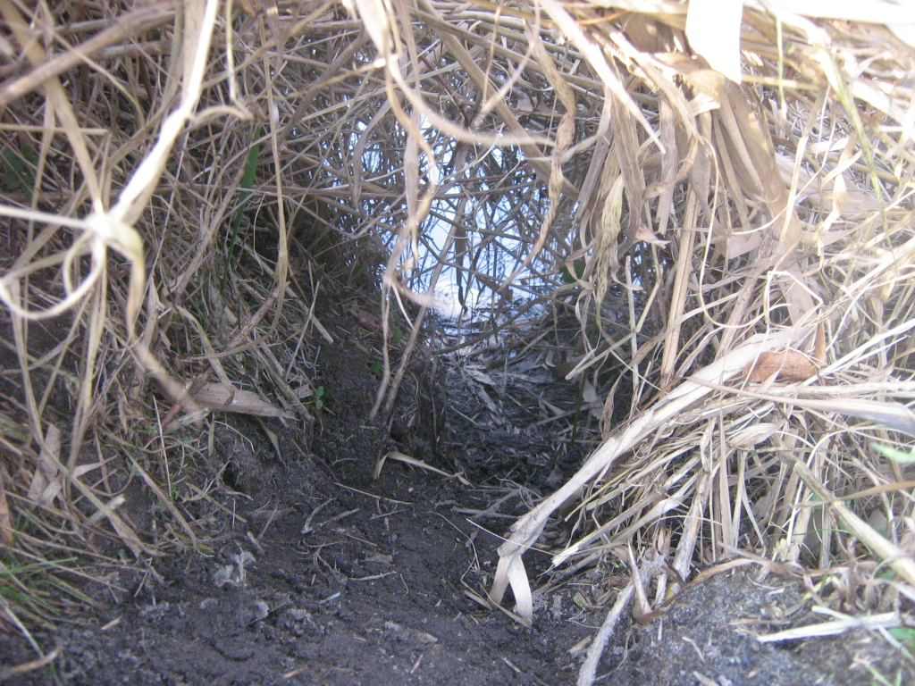 Röhrenförmiger Aus- und Einstieg eines Fischotters (Lutra lutra) am Ufer der Schnellen Havel bei Bischofswerder (Landkreis Oberhavel, Brandenburg).